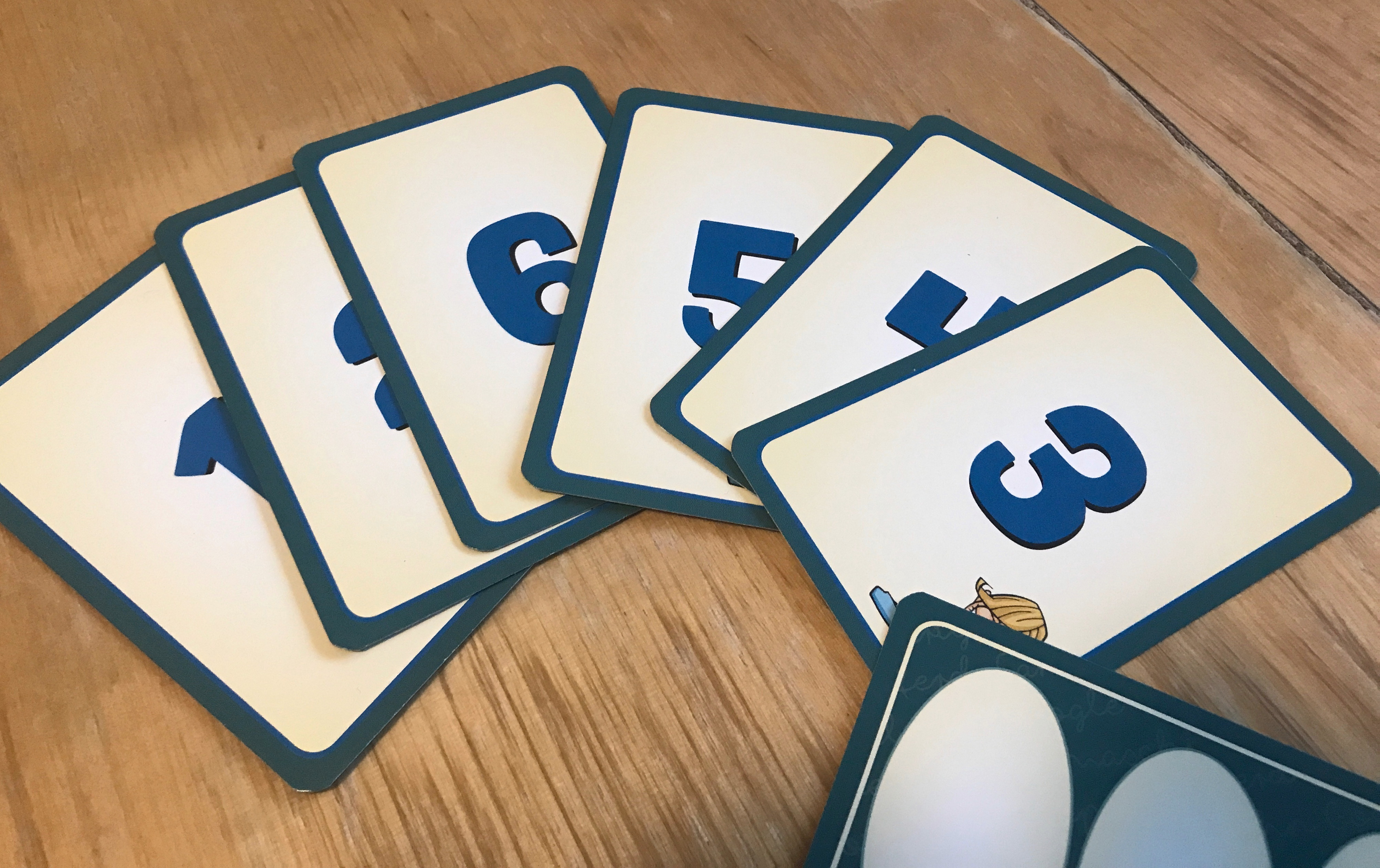 Spielmaterial für das Kartenspiel Haste Worte?